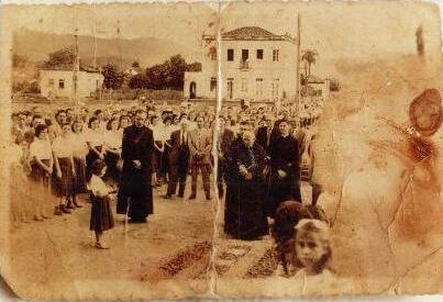 Religiosos vistoriam o terreno para construção da Igreja Nosso Senhor do Bom Fim em Braço do Norte, década de 1920.